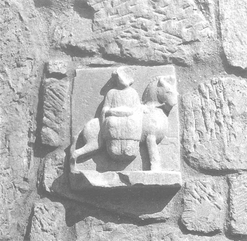 Epona, römisches Relief aus Hausen an der Zaber, Güglingen, Herzogskelter, an der Südseite neben dem Eingang.